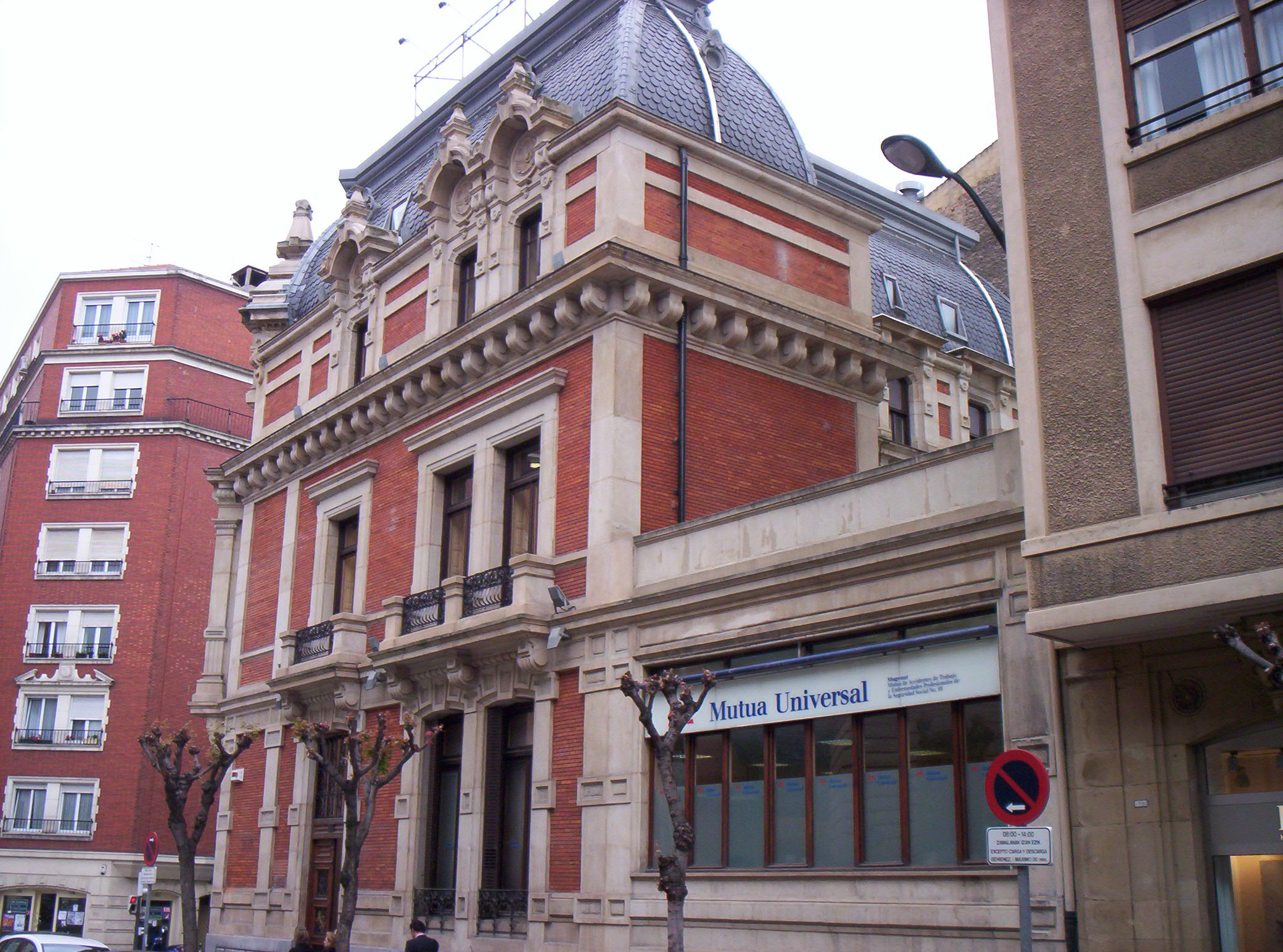 Edificio Mutua Universal en Bilbao